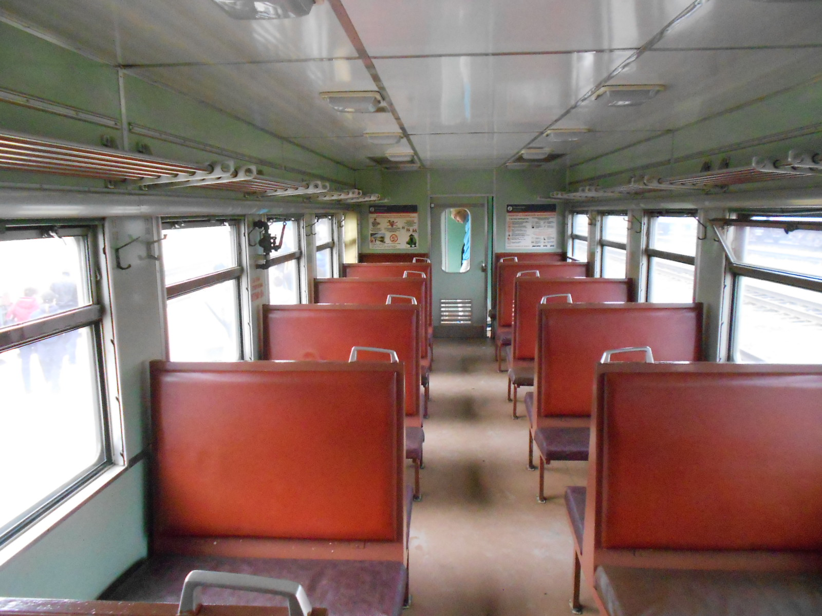 Салон дизель-поезда Д2